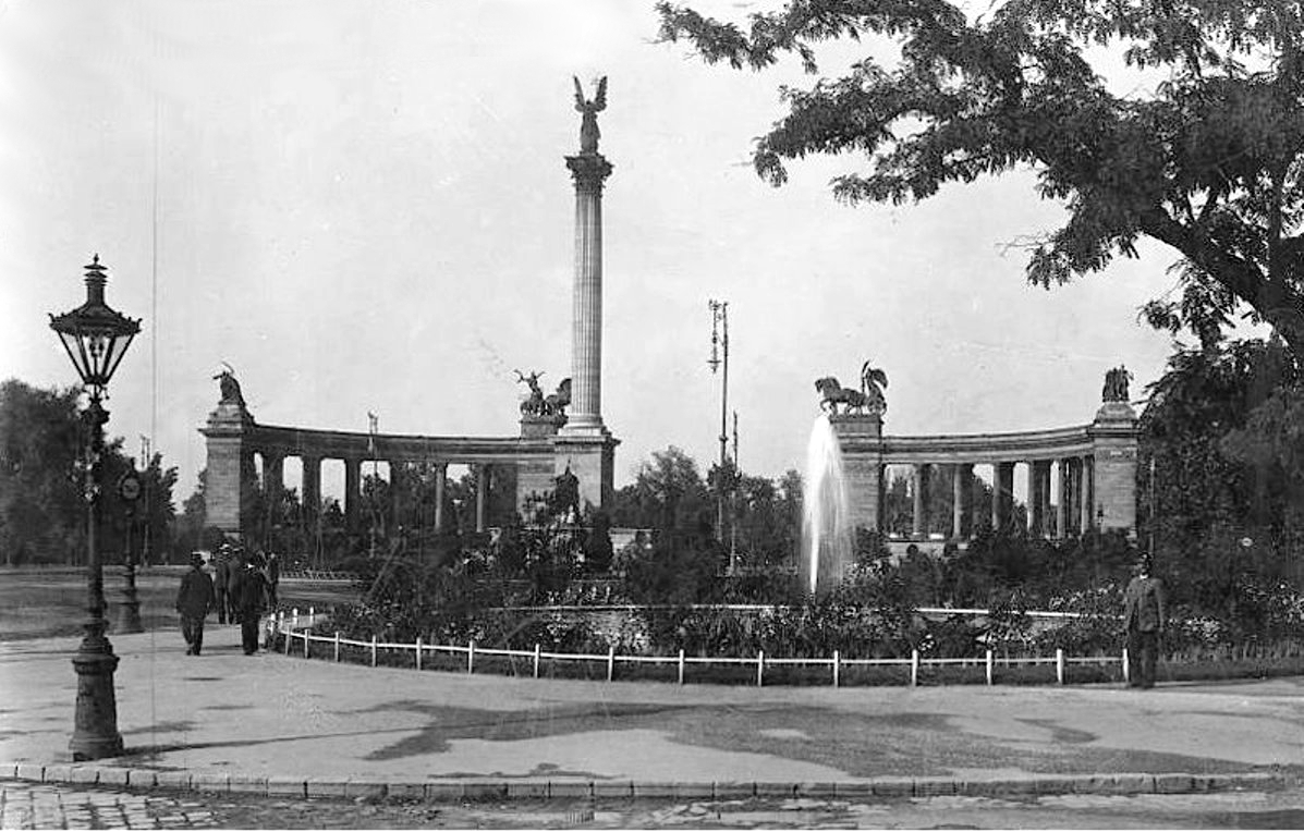 Hősök tere 1925-ben (Szabó Ervin Könyvtár Budapest Gyűjtemény)